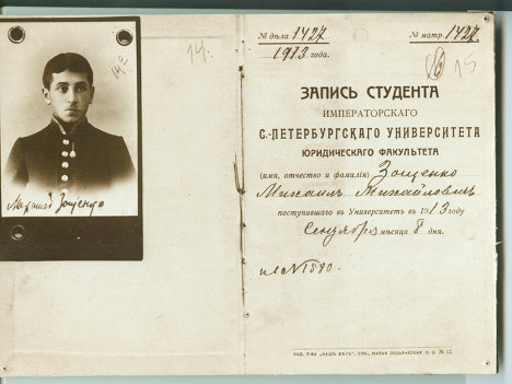 Михаил Зощенко. Запись студента Императорскаго университета.